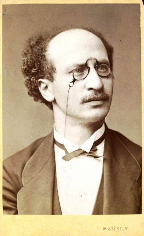 Jakob Grün (1837–1916), österreichischer Violinist und Geigenlehrer, Mitglied der Wiener Philharmoniker.